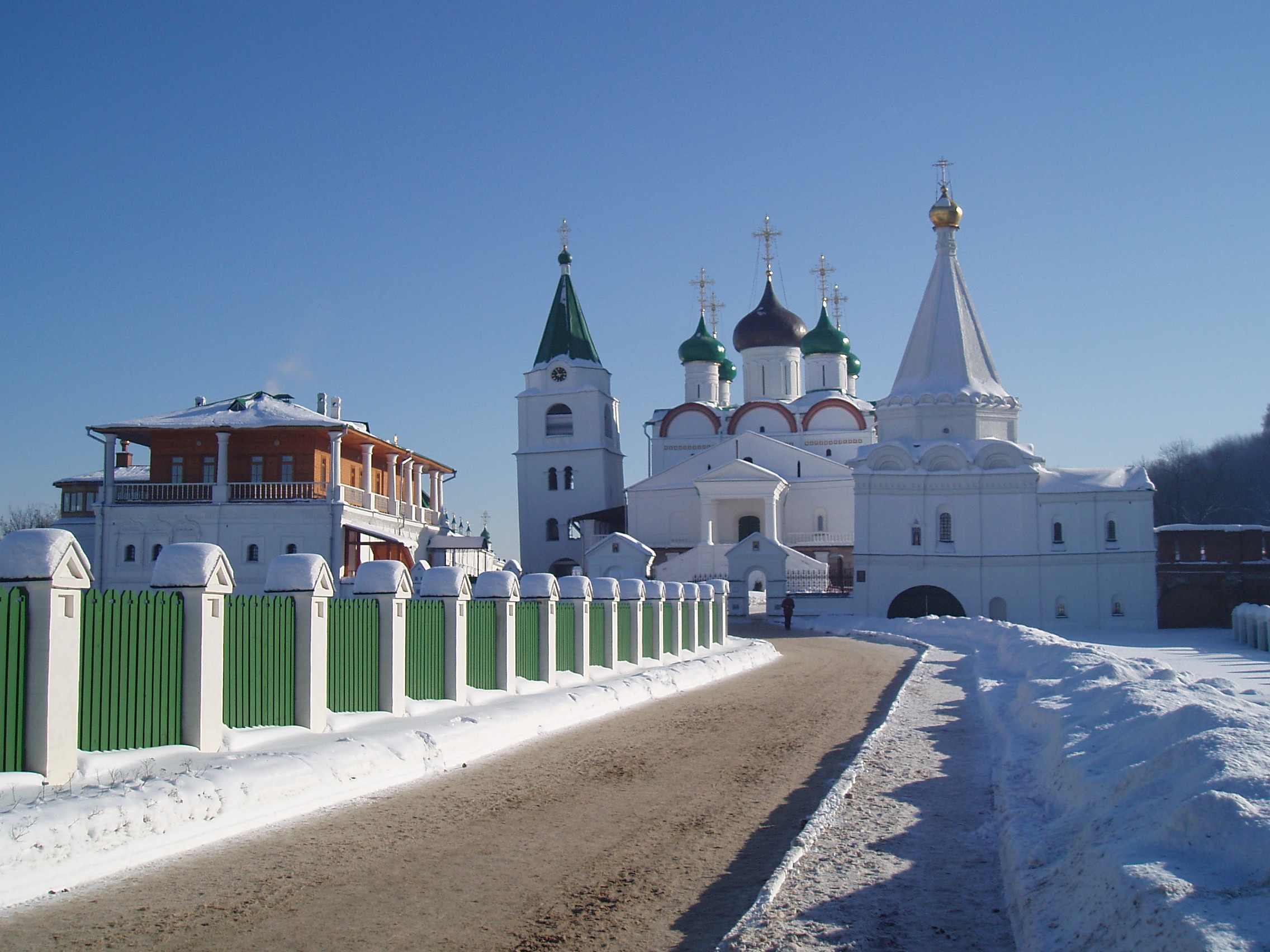 Вид с территории Печерского Вознесенского монастыря. Слева - Архиерейские палаты